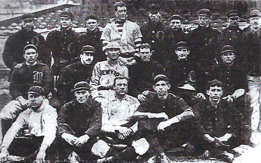 1901 Baltimore Orioles